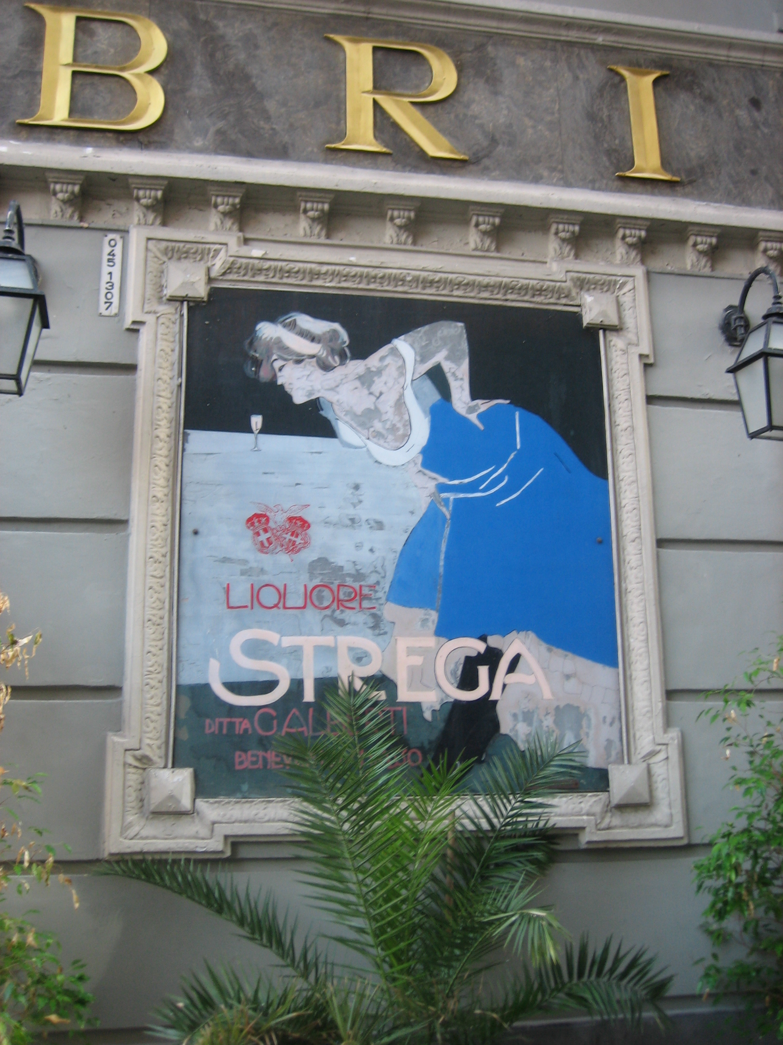 Antica pubblicità picturale della liquore Strega sulla facciata del Caffè Gambrinus a Napoli - Italia.